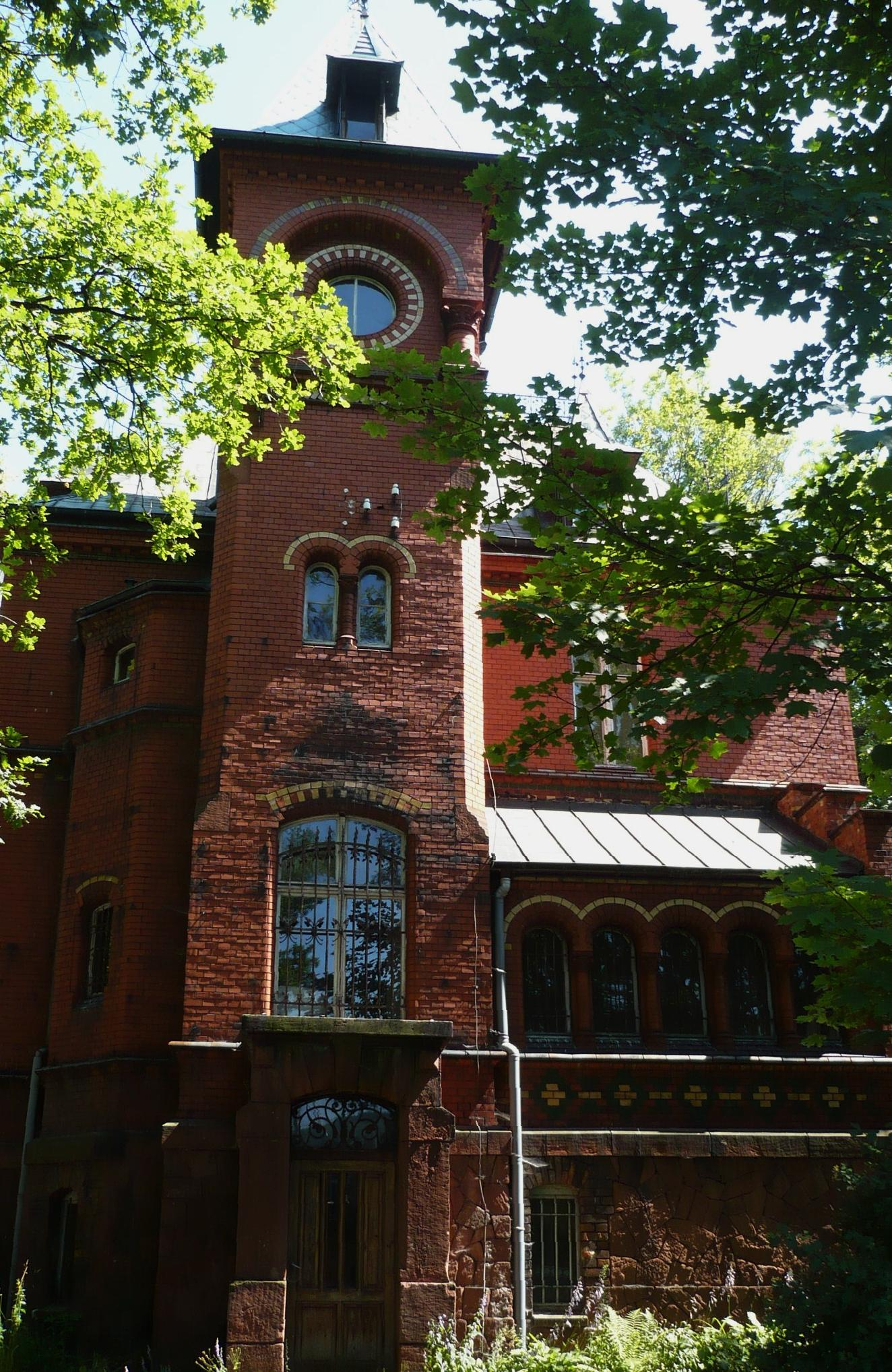 Nowa Ruda, ul. Mikołaja Kopernika 8 - Willa Rose, 1886